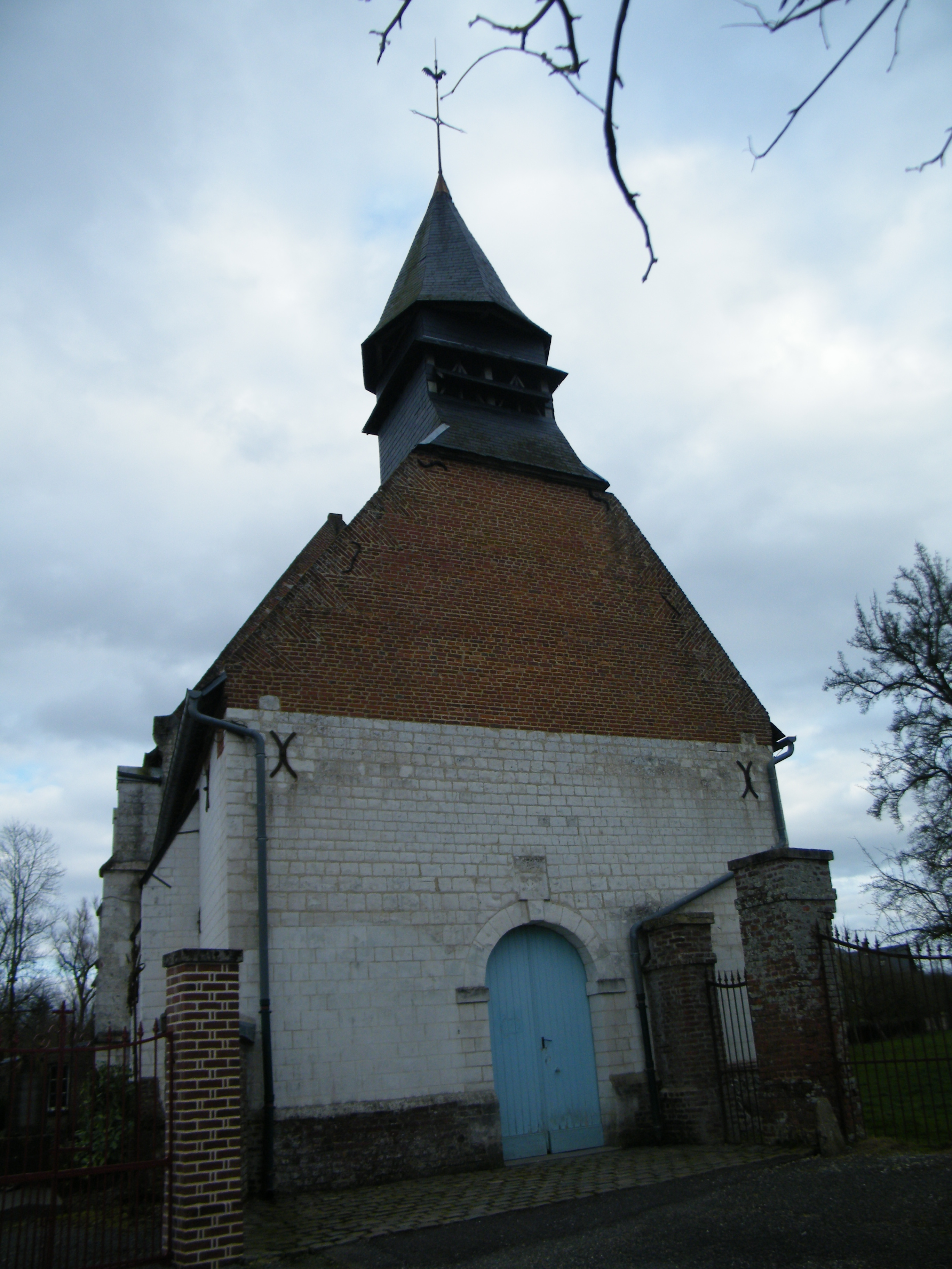 église 2